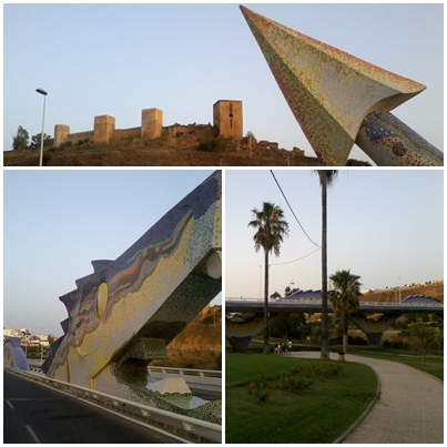 El Puente del Dragón de Alcalá de Guadaíra, provincia de Sevilla (España) es un puente figurativo que forma parte de la circunvalación de Alcalá de Guadaíra, y que destaca por ser el único puente figurativo de Europa